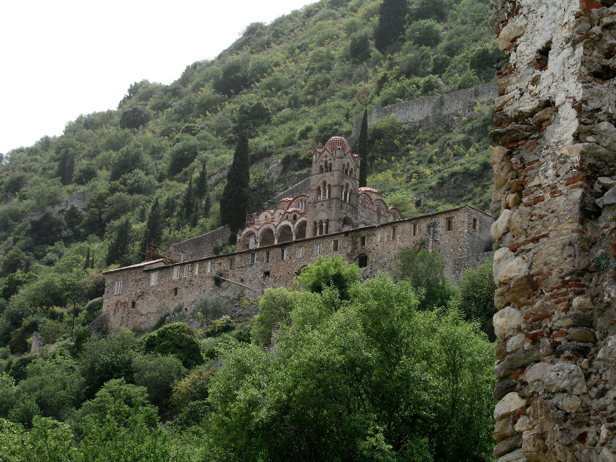 Kloster Pantanassa in Mystra (1)